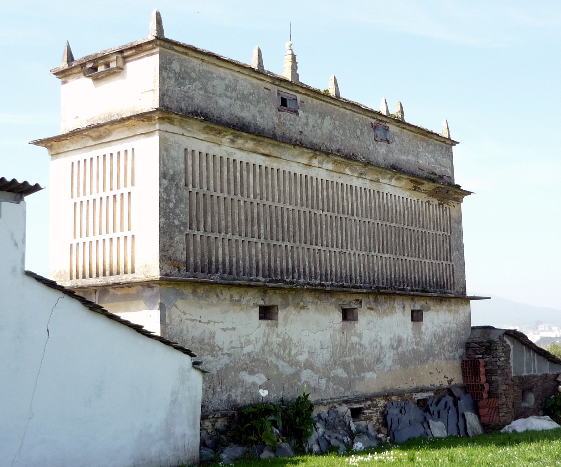 Hórreos en Viladaíde, Concello de Barreiros, Lugo. Os únicos de tres pisos da contorna.